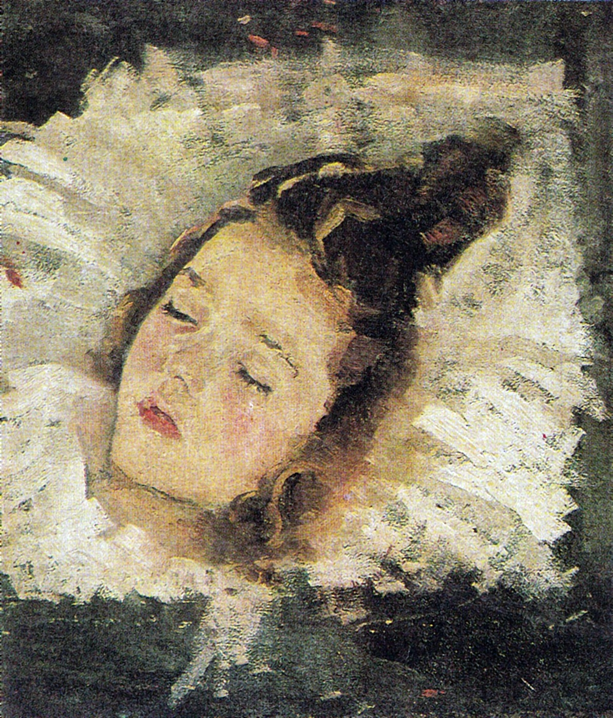 Fetita dormind